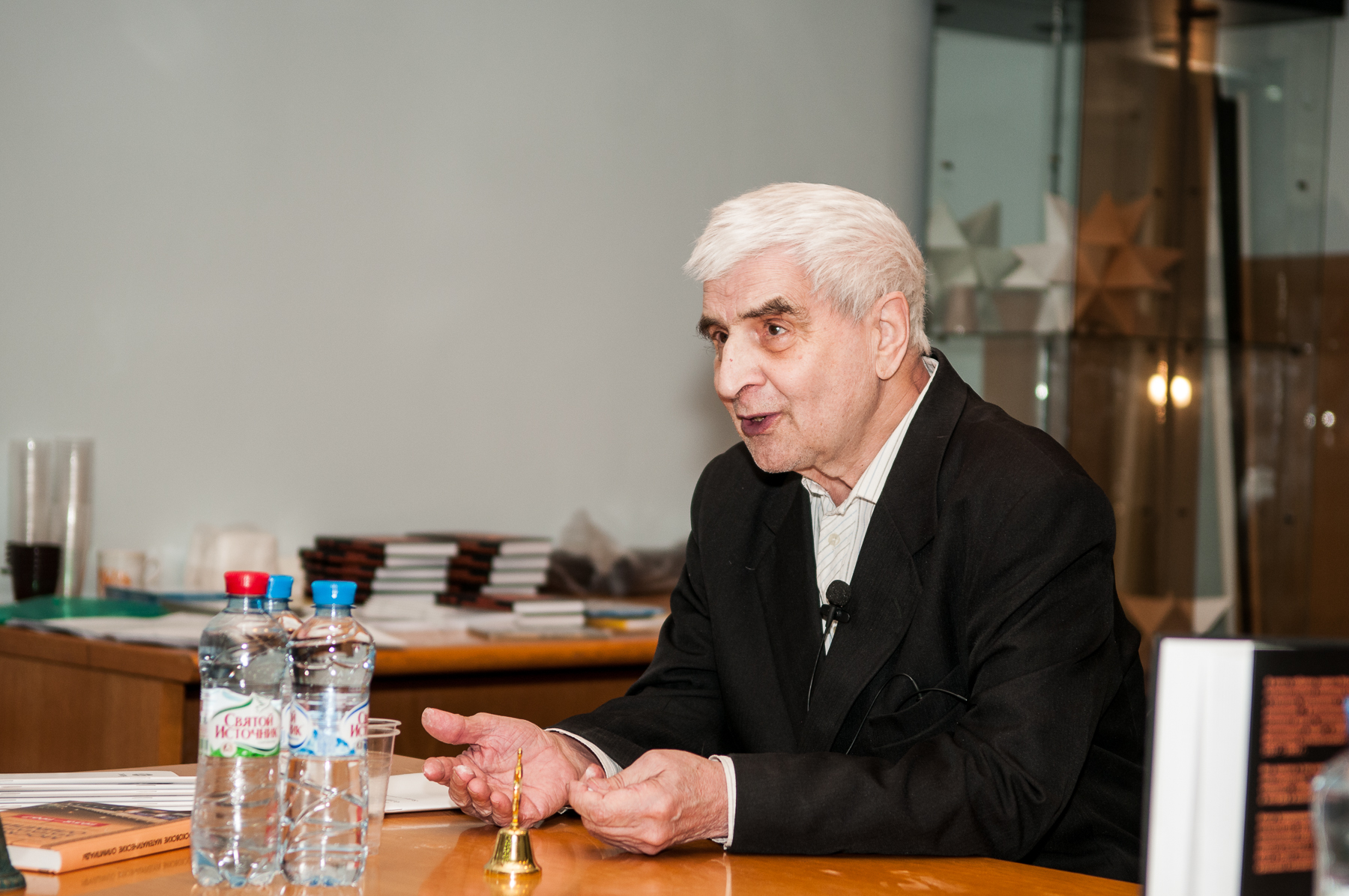 Константинов Николай Ниаколаевич